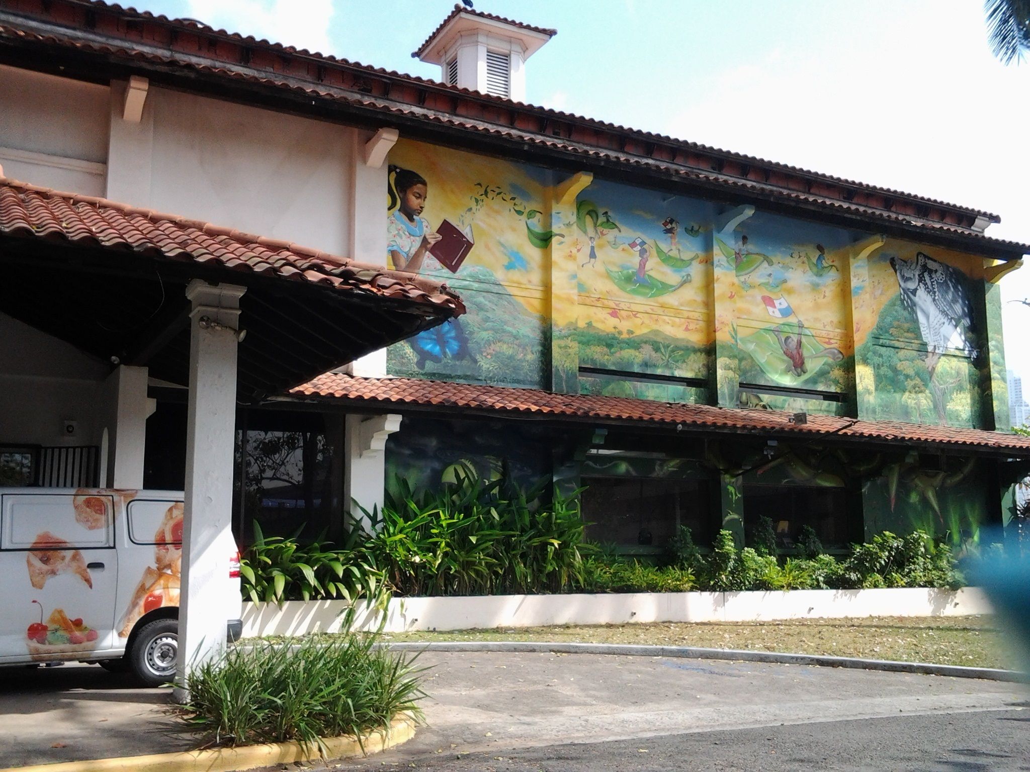 Fachada de la parte frontal del Museo de Arte Contemporáneo (Panamá) . El museo está ubicado en el corregimiento de Ancón, Ciudad de Panamá, República de Panamá.